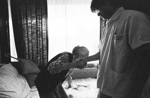 Altenpflege durchgeführt von einem Zivildienstleistenden in München